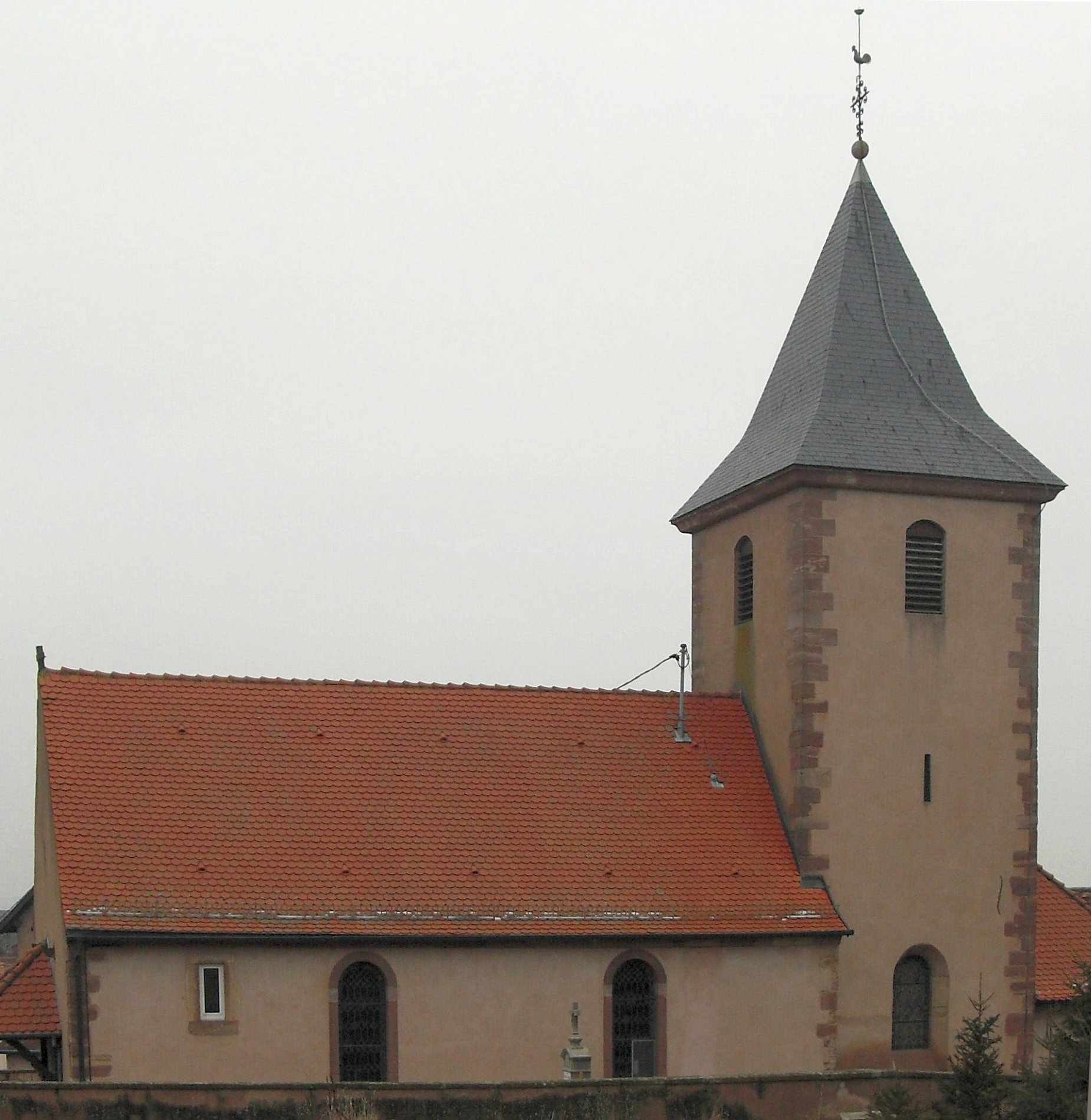 L'église Saint-Martin à Rangen